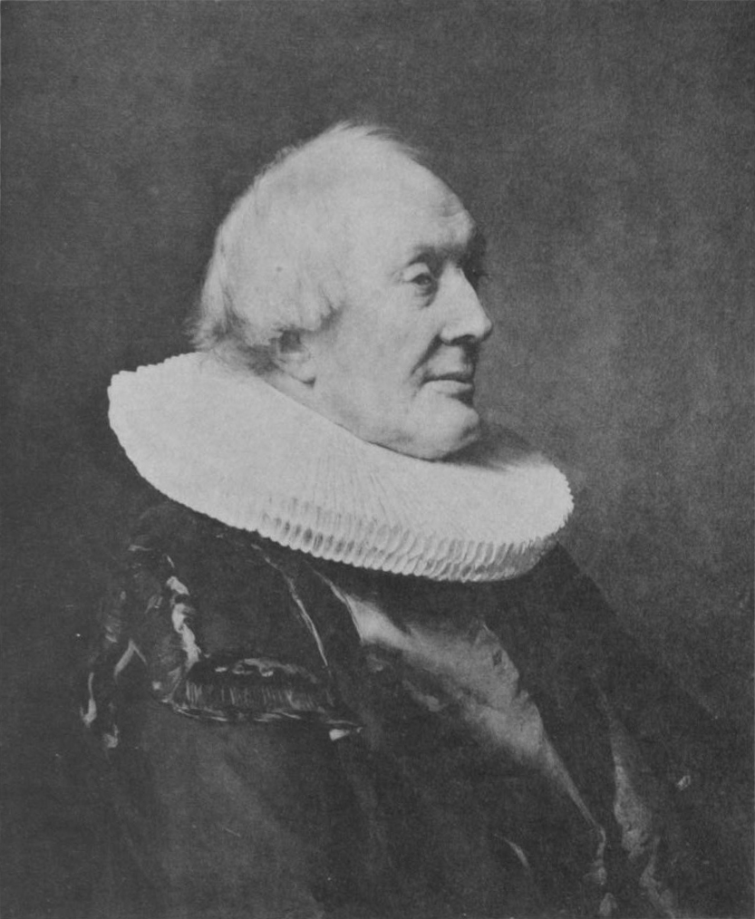 Porträt Ludwig Heinrich Kunhardt von Hermann Steinfurth